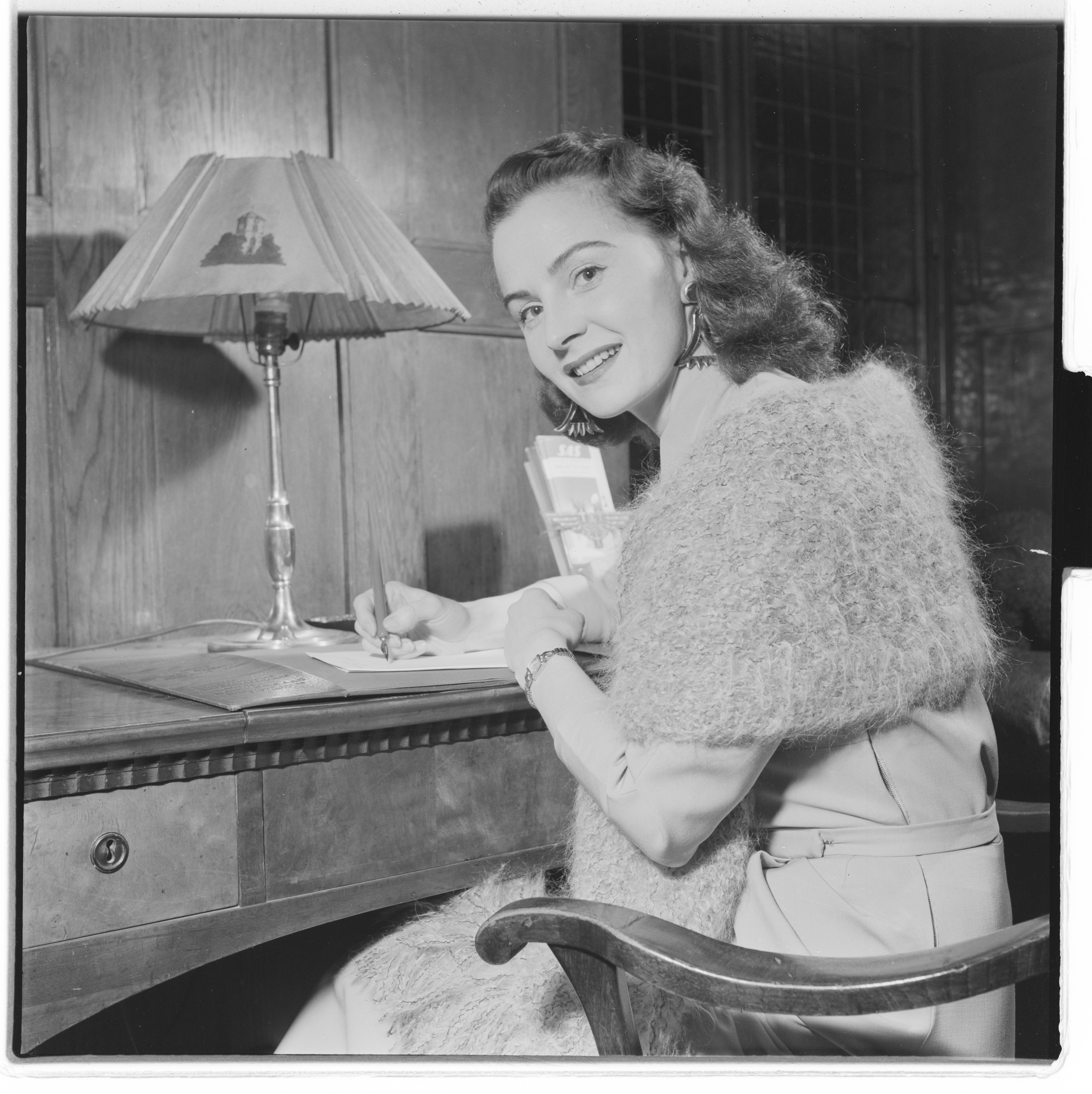 Bildet er hentet fra Arkivverket. Margareta Fahlen, Hustruleken, Trøndelag teater Arkivinstitusjon : Riksarkivet Arkivnavn : Billedbladet NÅ Sted : Norge, Ukjent, Ukjent, Ukjent Emneord: Kvinner, Portretter Avbildet: Fahlén, Margareta